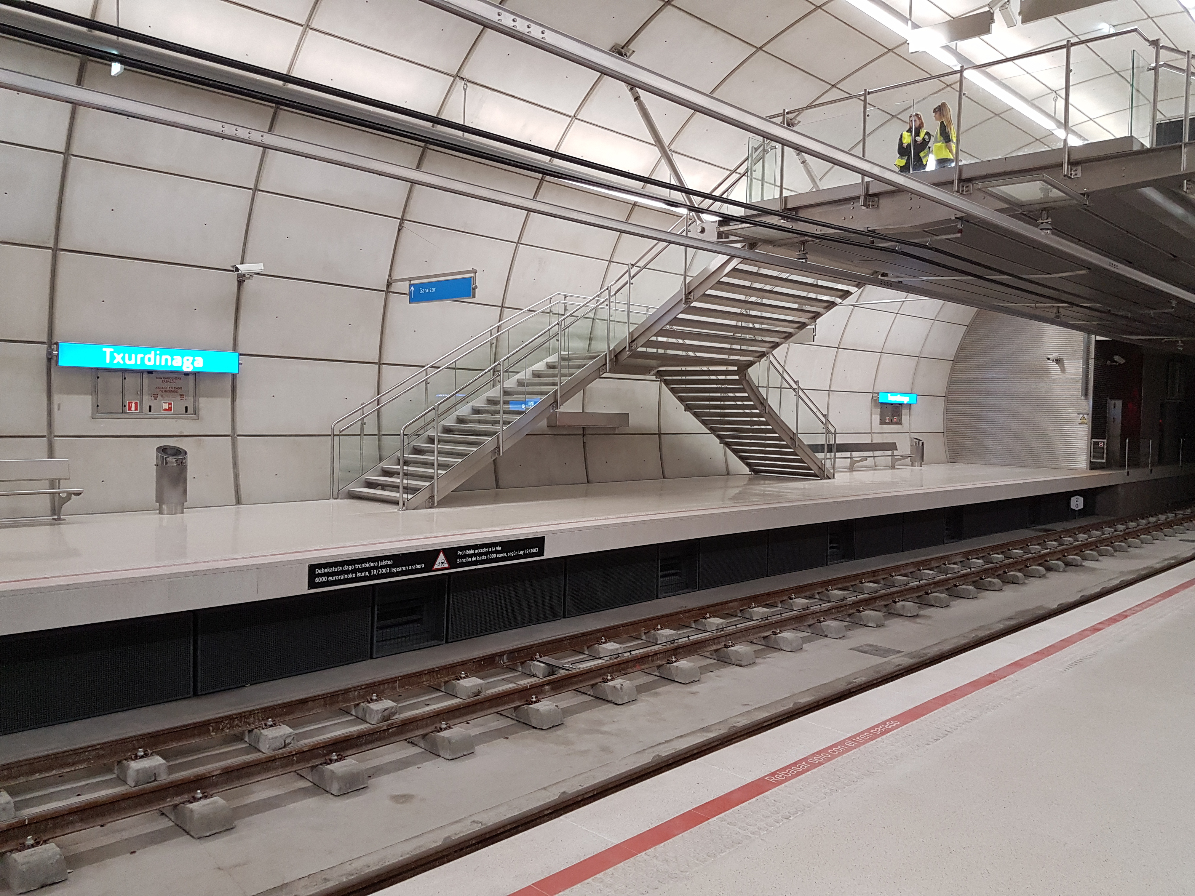 Estación de Txurdinaga.